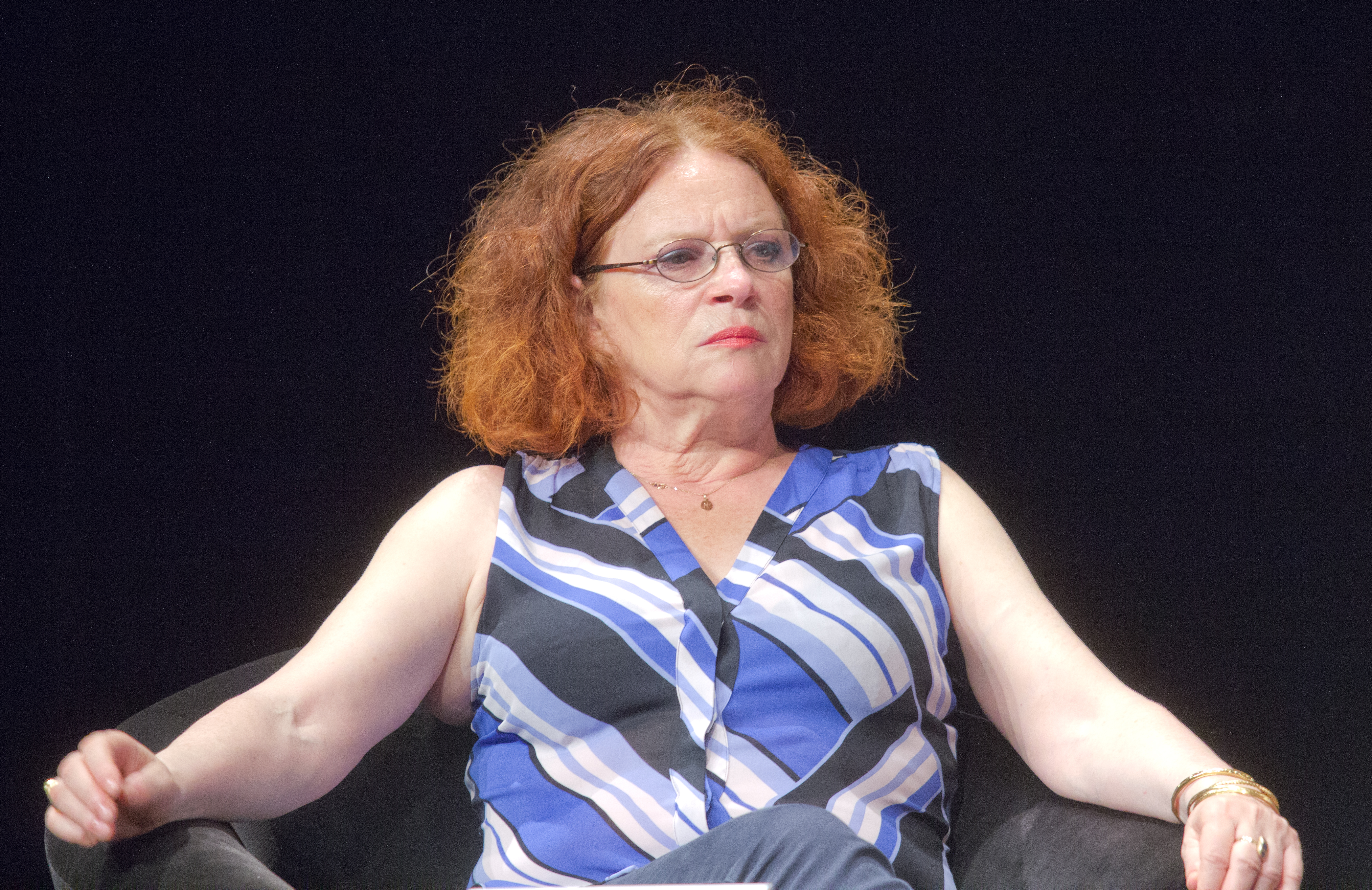 Birlikte - Podiumsdiskussion mit Heiko Maas (Bundesminister der Justiz und für Verbraucherschutz), Stefan Aust (Journalist), Mehmet Daimagüler (Rechtsanwalt im NSU-Prozess), Anetta Kahane (Vorsitzende der Amadeu Antonio Stiftung), Abdulla Özkan (Augenzeuge). Moderation: Hans-Ulrich Jörges, Mitglied der stern-Chefredaktion. Ort: Depot des Schauspiel Köln Foto: Anetta Kahane